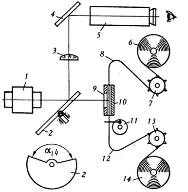 Կինոնկարահանման ապարատ